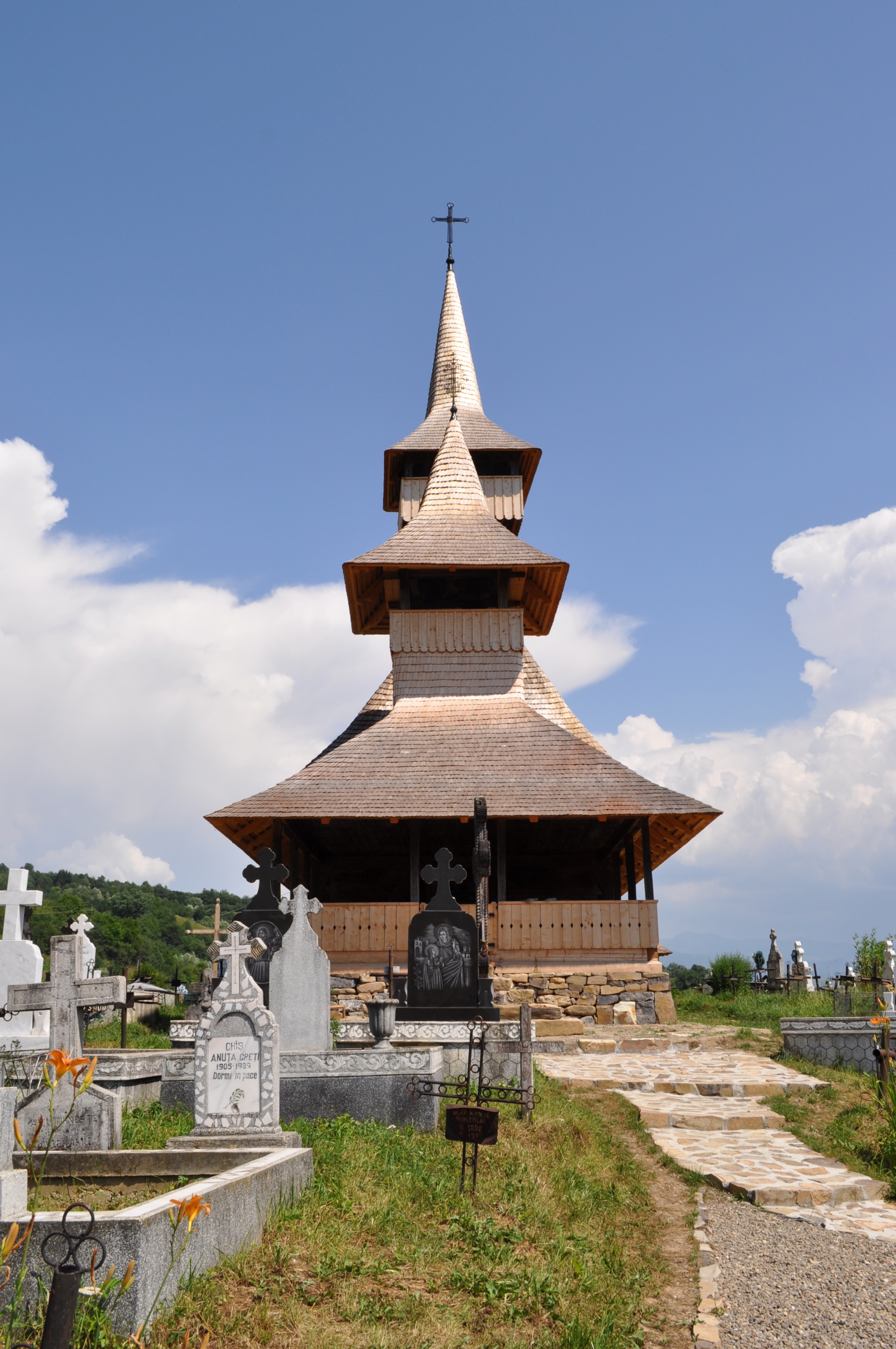 Biserica de lemn "Sfântul Nicolae" (a Nistoreştilor) , oraş SĂLIŞTEA DE SUS